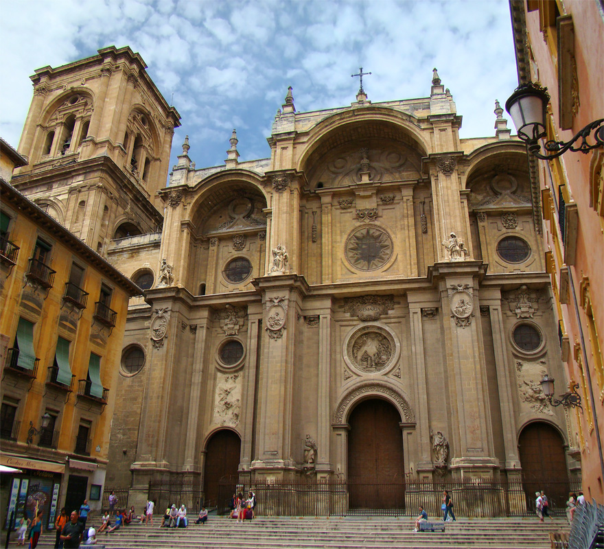 Catedral de Granada, Andalucía, España.